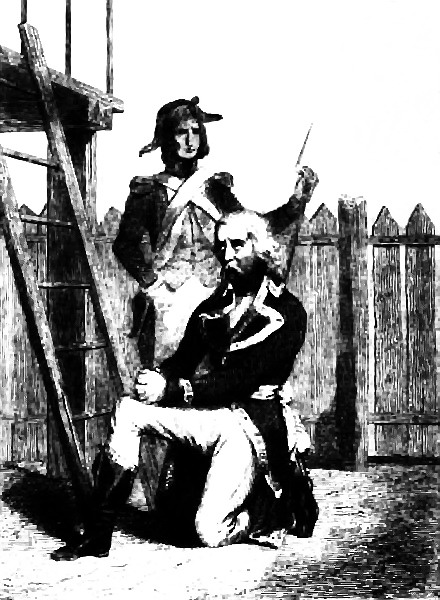 Le général Custines au pied de l'échafaud